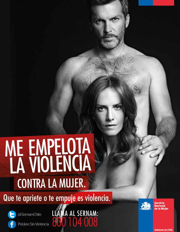 Campaña “Me Empelota la Violencia Contra la Mujer” del Sernam, protagonizada por Cristian Sánchez y Diana Bolocco.